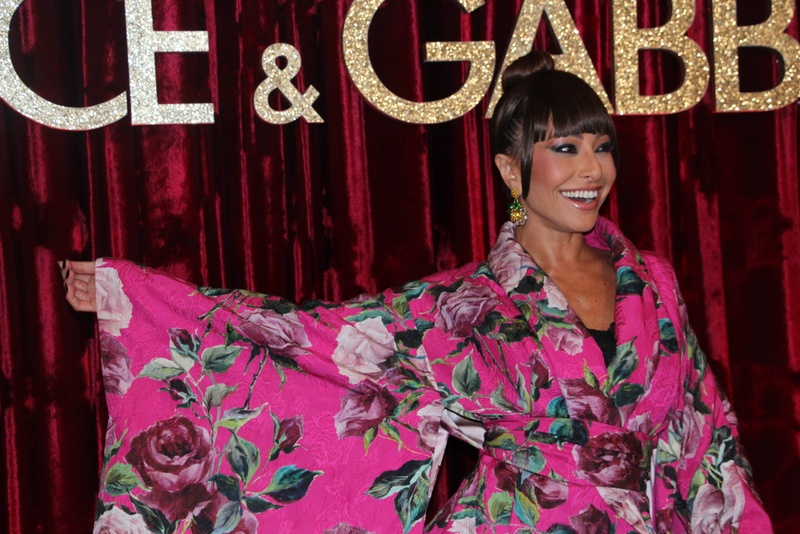 Sabrina Sato-002